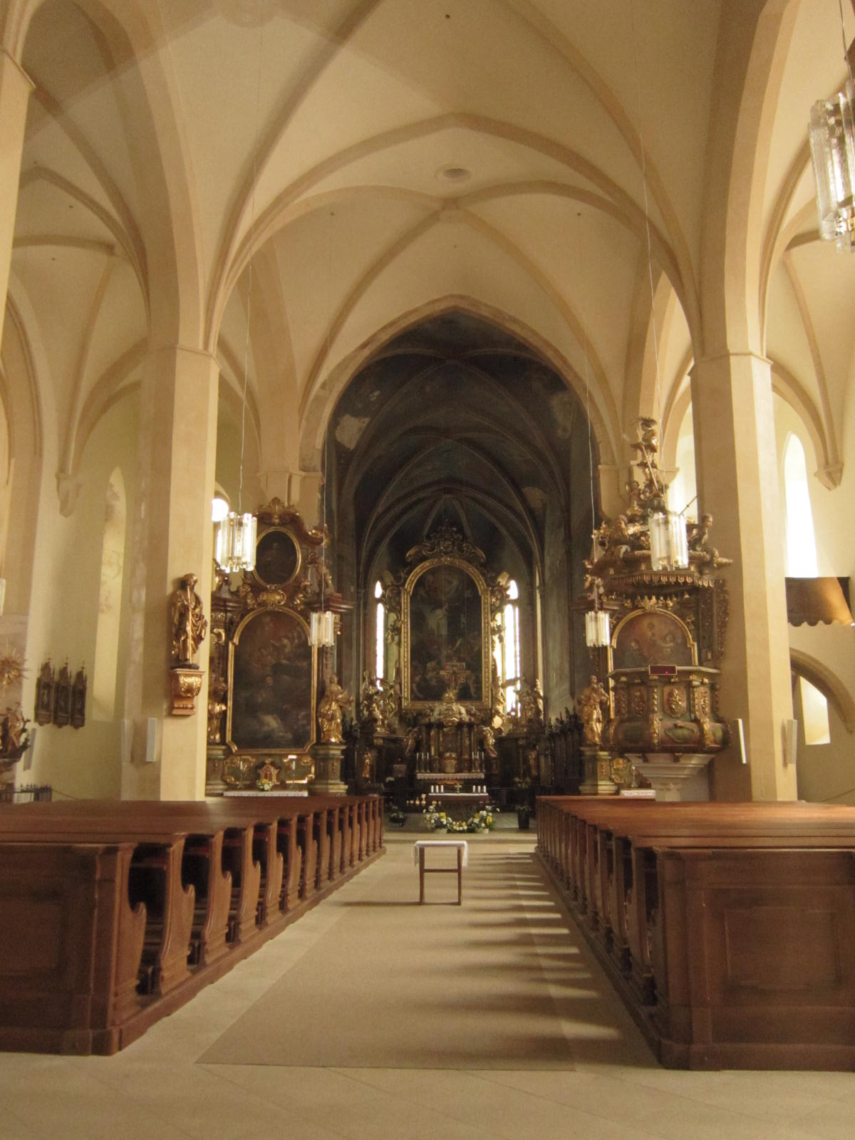 Kostel sv. Jakuba (Jihlava), Jakubské nám. , Jihlava, Jihlava.